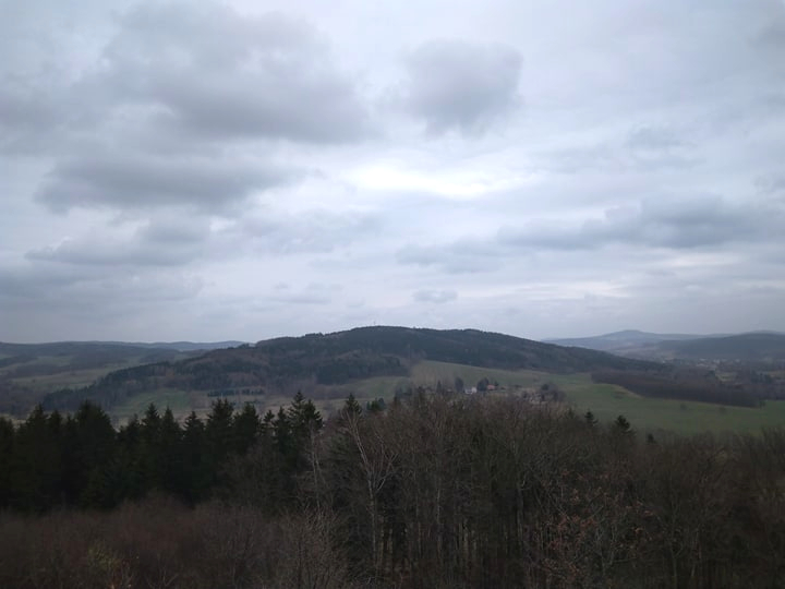 Ječný vrch ve Šluknovské pahorkatině, pohled z Poustevníku